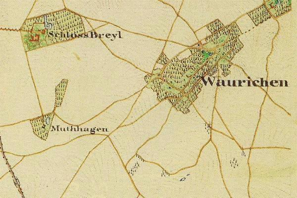 Preußische Kartenaufnahme 1846 - Uraufnahme - (5002 Geilenkirchen)